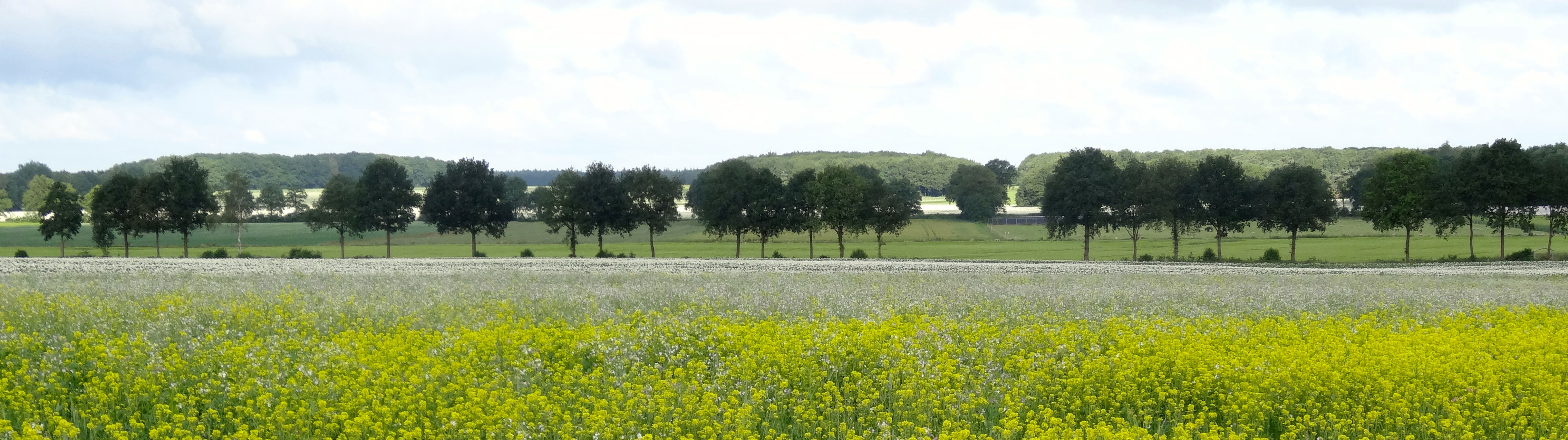 Zicht vanaf de Buurnerbult naar het westen in de richting van de Hondsrug